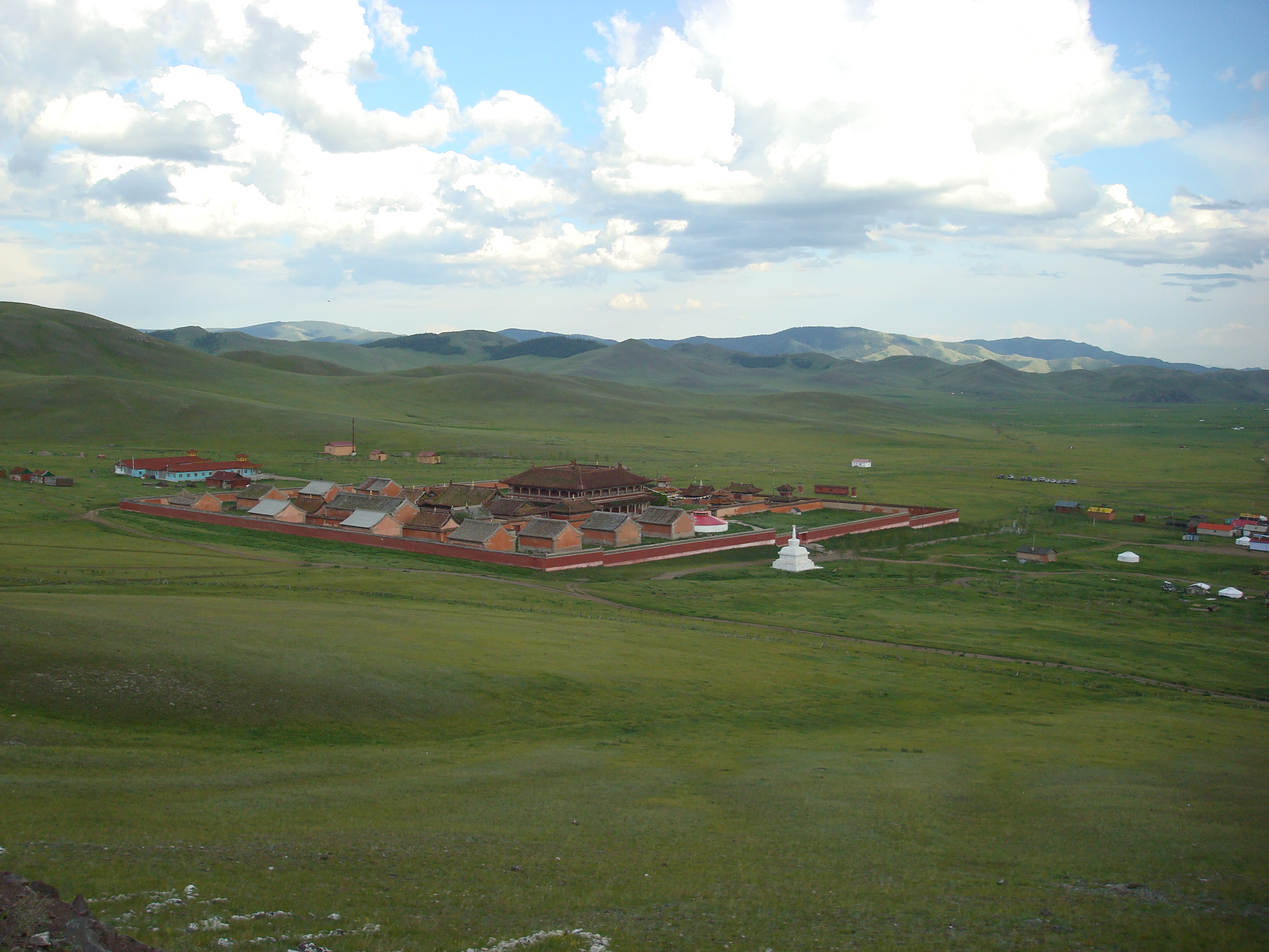 Blick auf das Kloster Amarbayasgalant